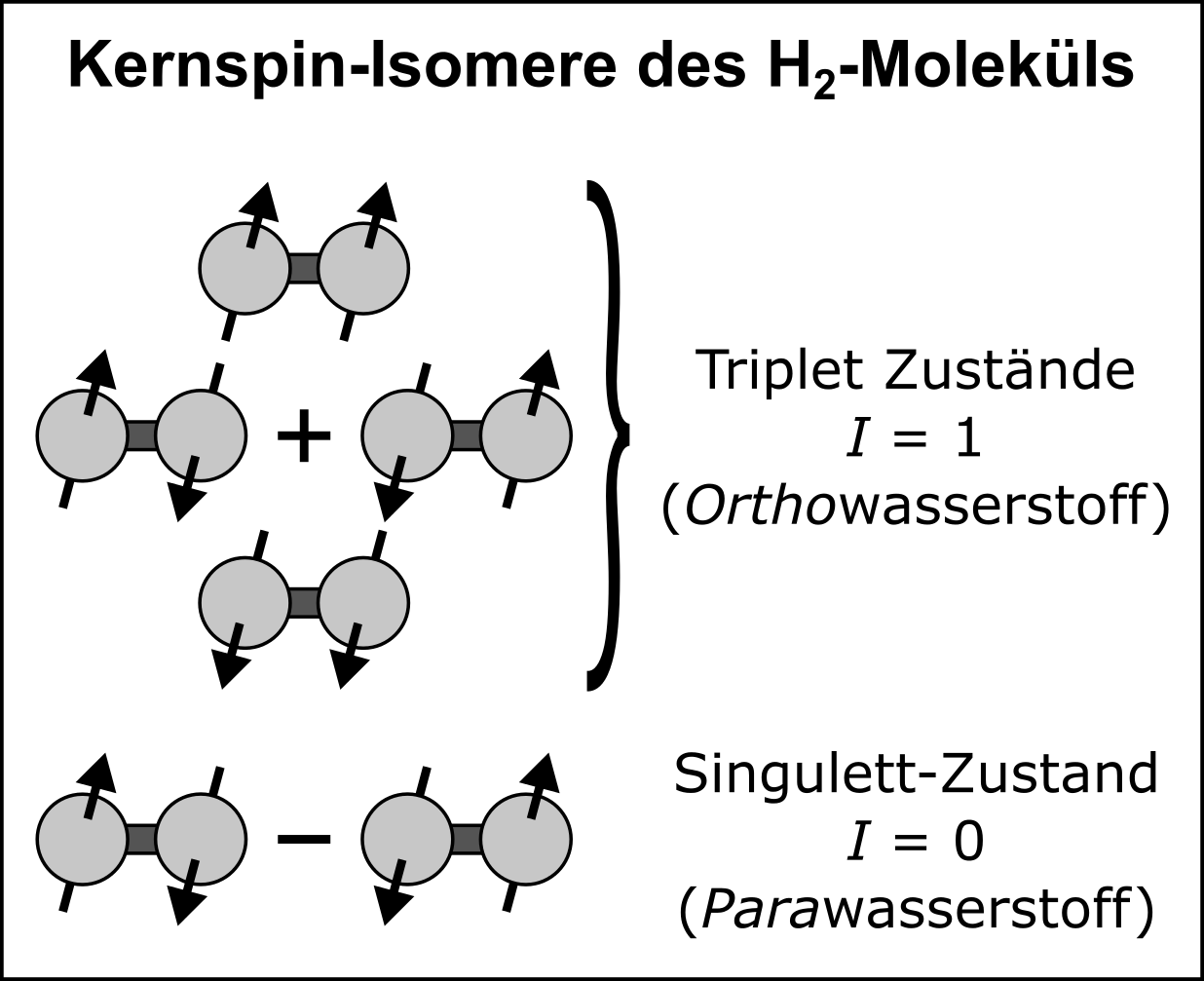 Kernspin-Isomere des Wasserstoffmoleküls